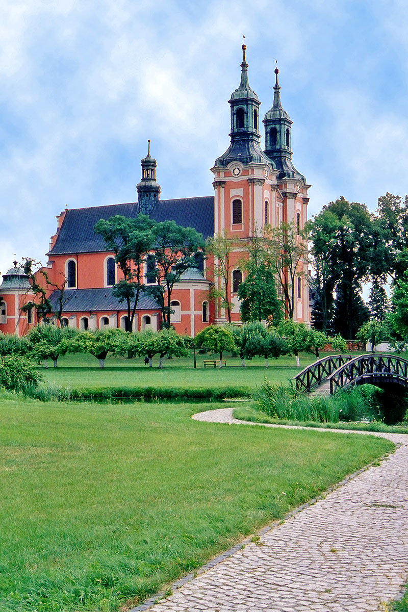 Gościkowo-Paradyż - seminarium